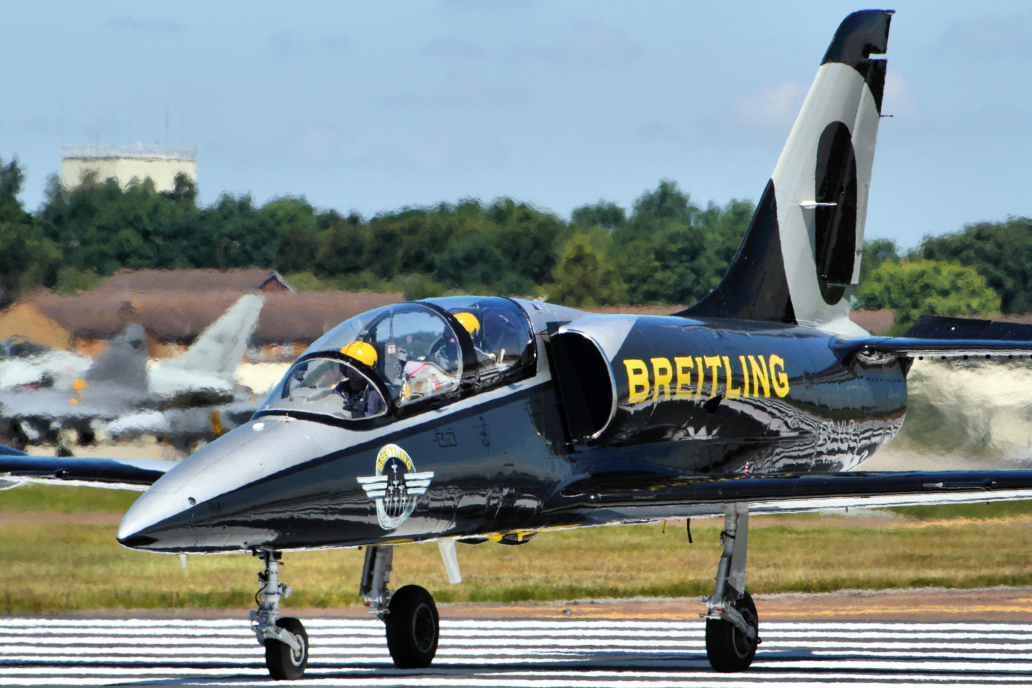 L39 Albatros - RIAT 2014